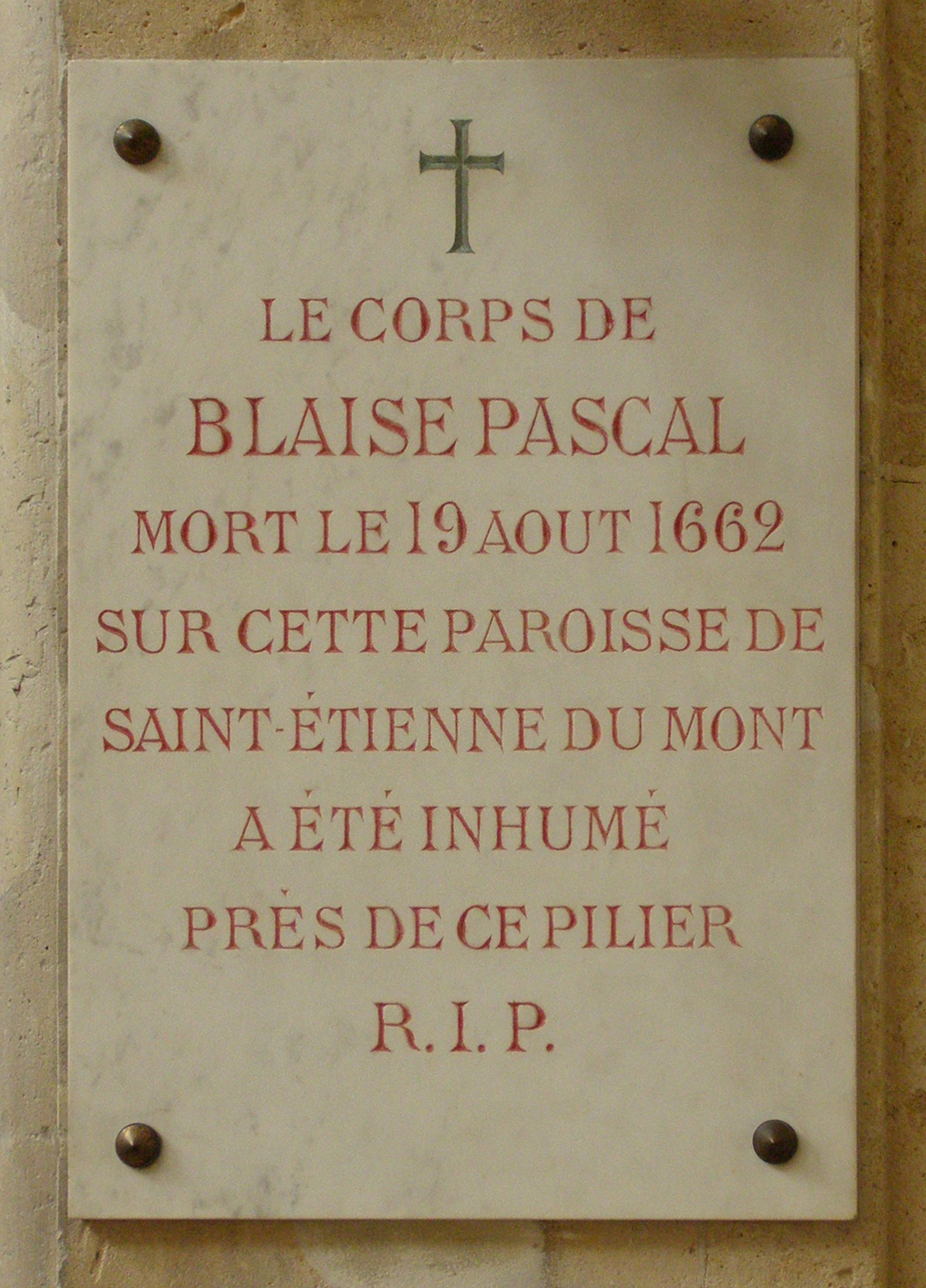 Epitafium Błażeja Pascala w kościele St Etienne du Mont w Paryżu